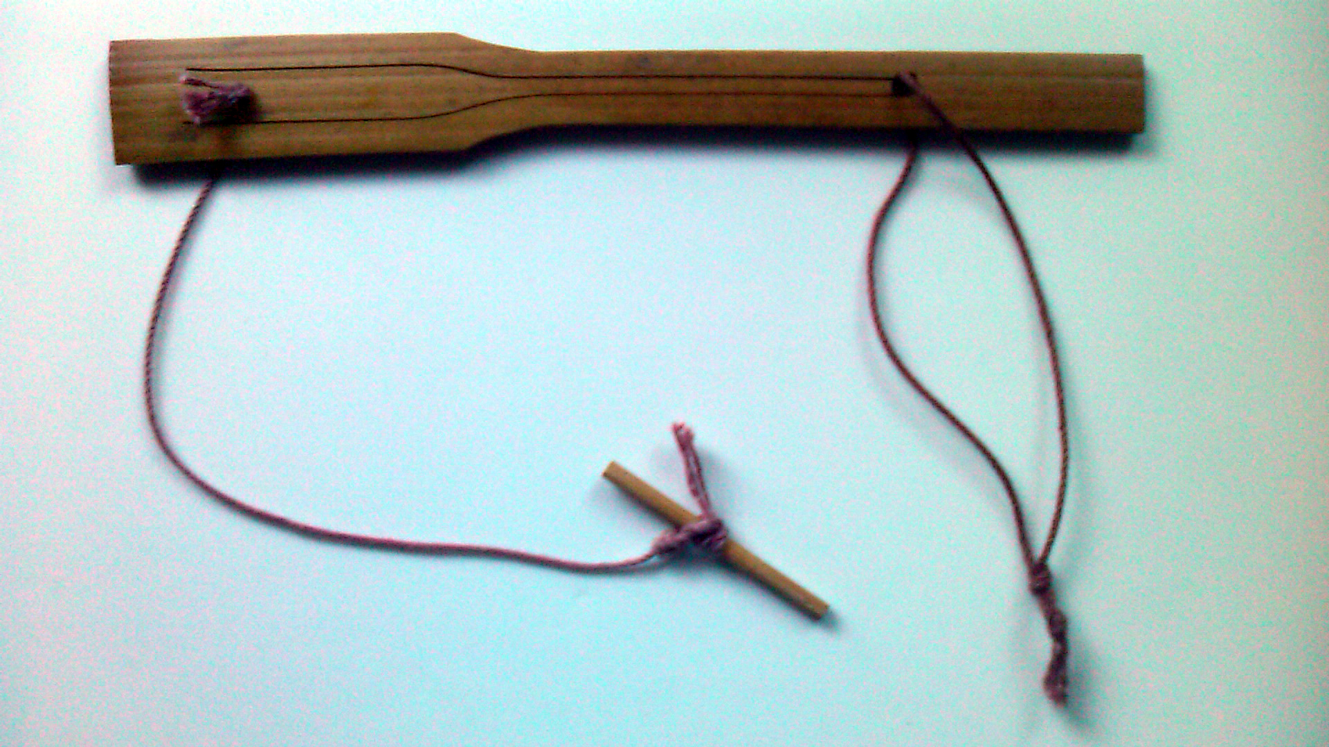 アイヌの楽器ムックリ